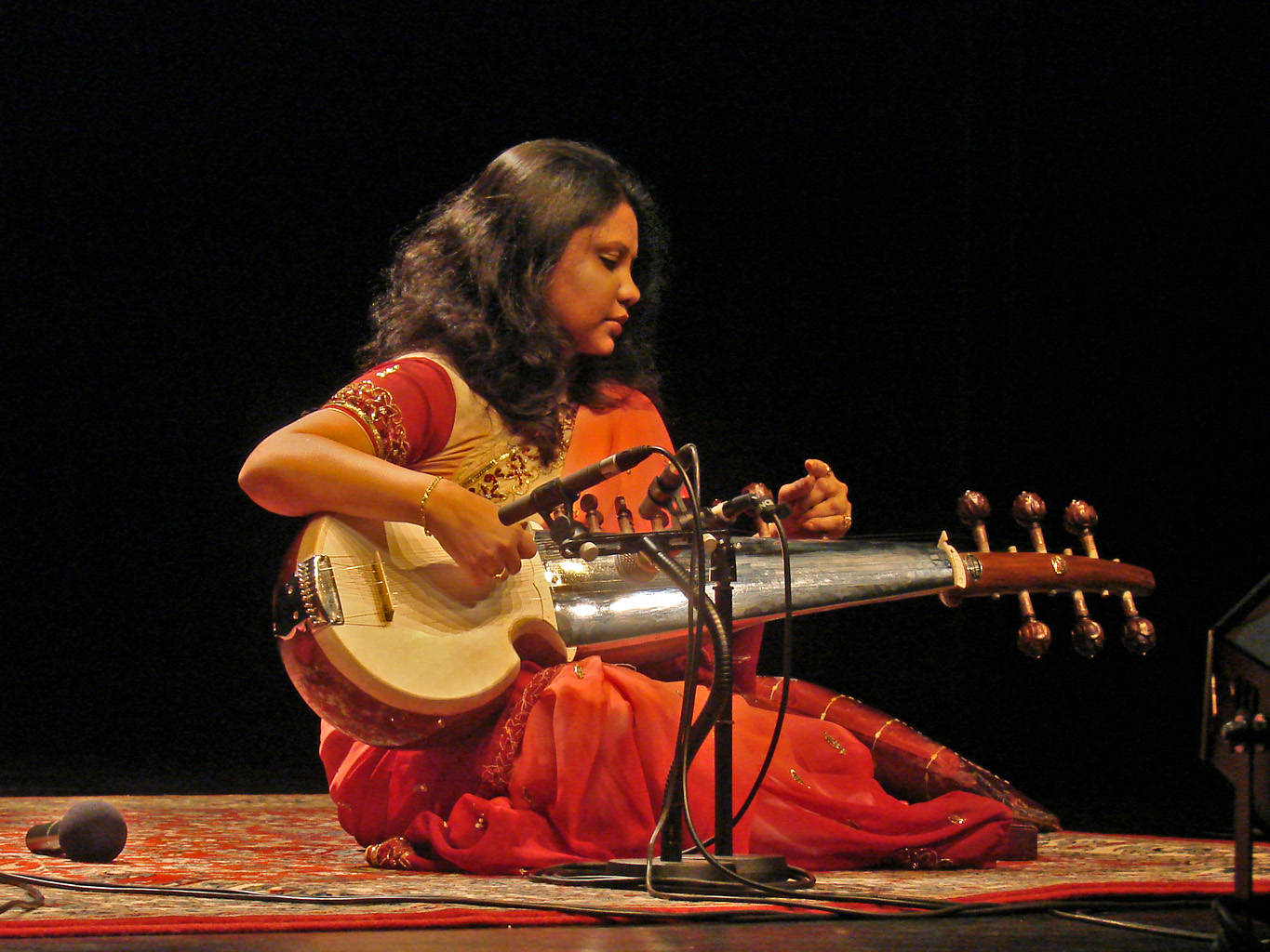 Sudheshna Bhattacharya en train d'accorder son sarod.